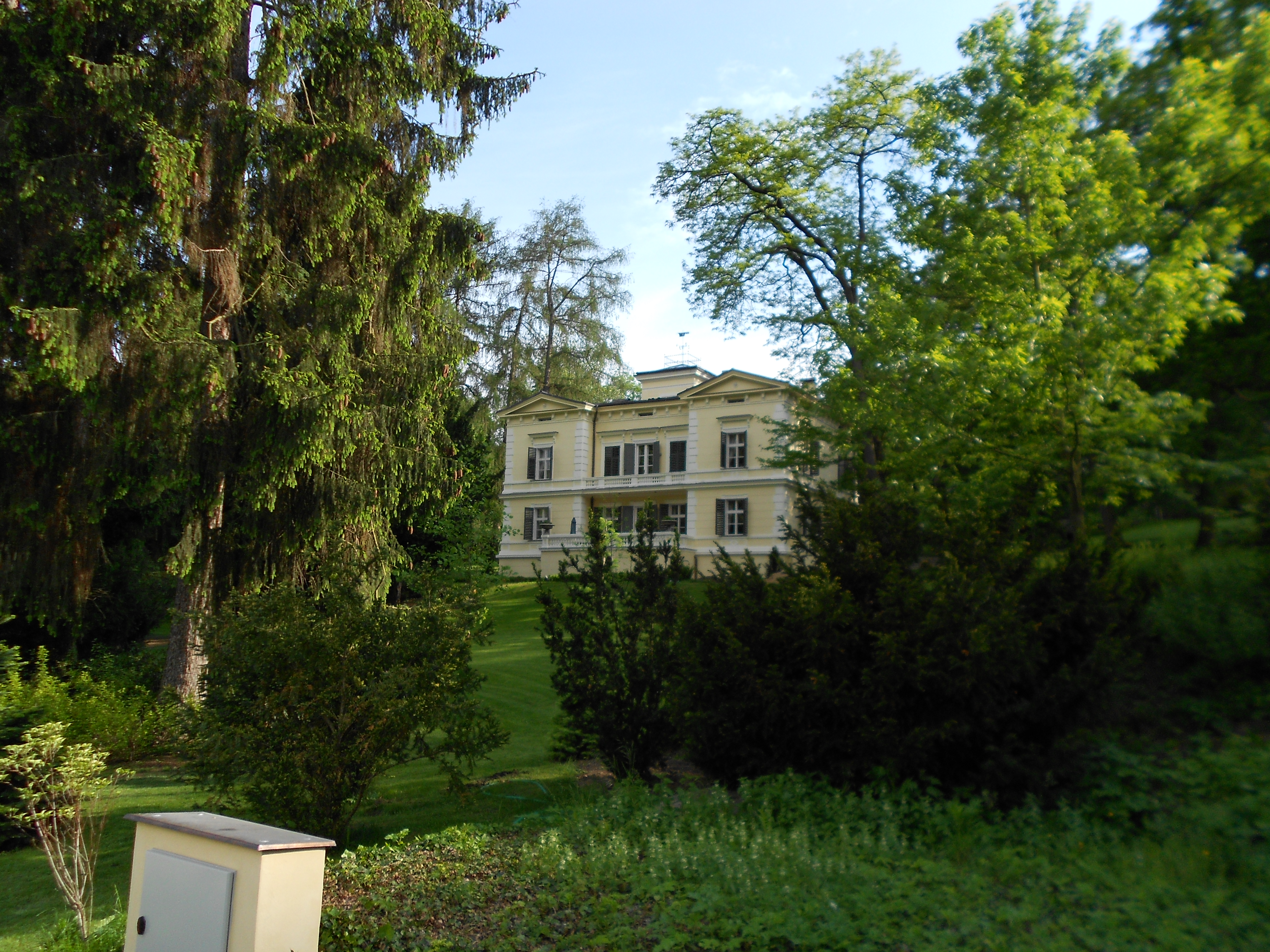 Vila Zuzanka, V Šáreckém údolí 83/78.